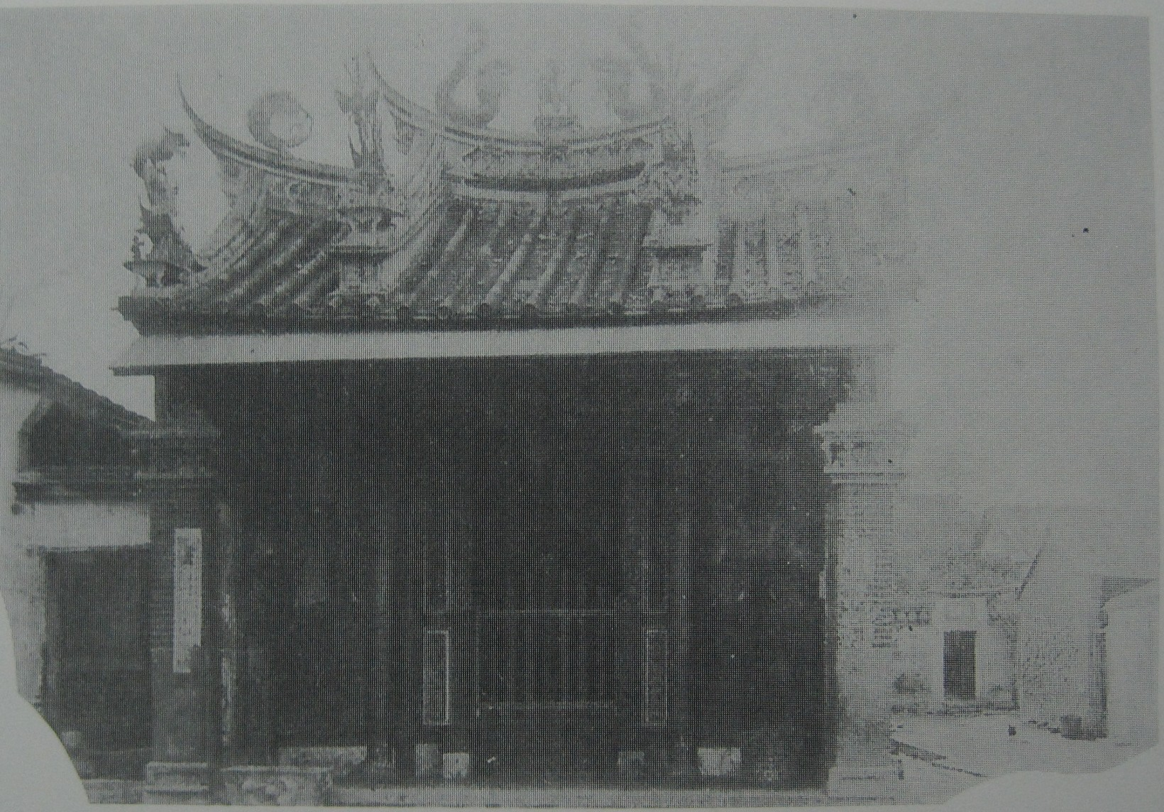 1933年前的臺南沙陶宮